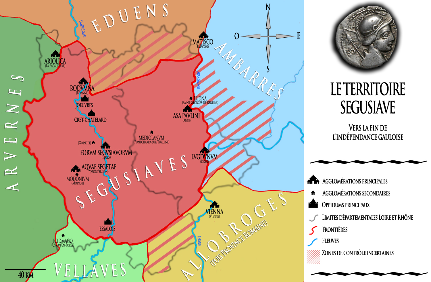 Carte des limites approximatives du territoire des Ségusiaves